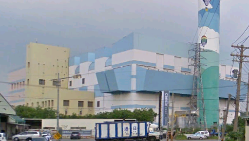 仁武垃圾焚化廠。